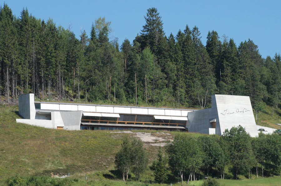 Ivar Aasen-tunet, Ørsta, Noreg